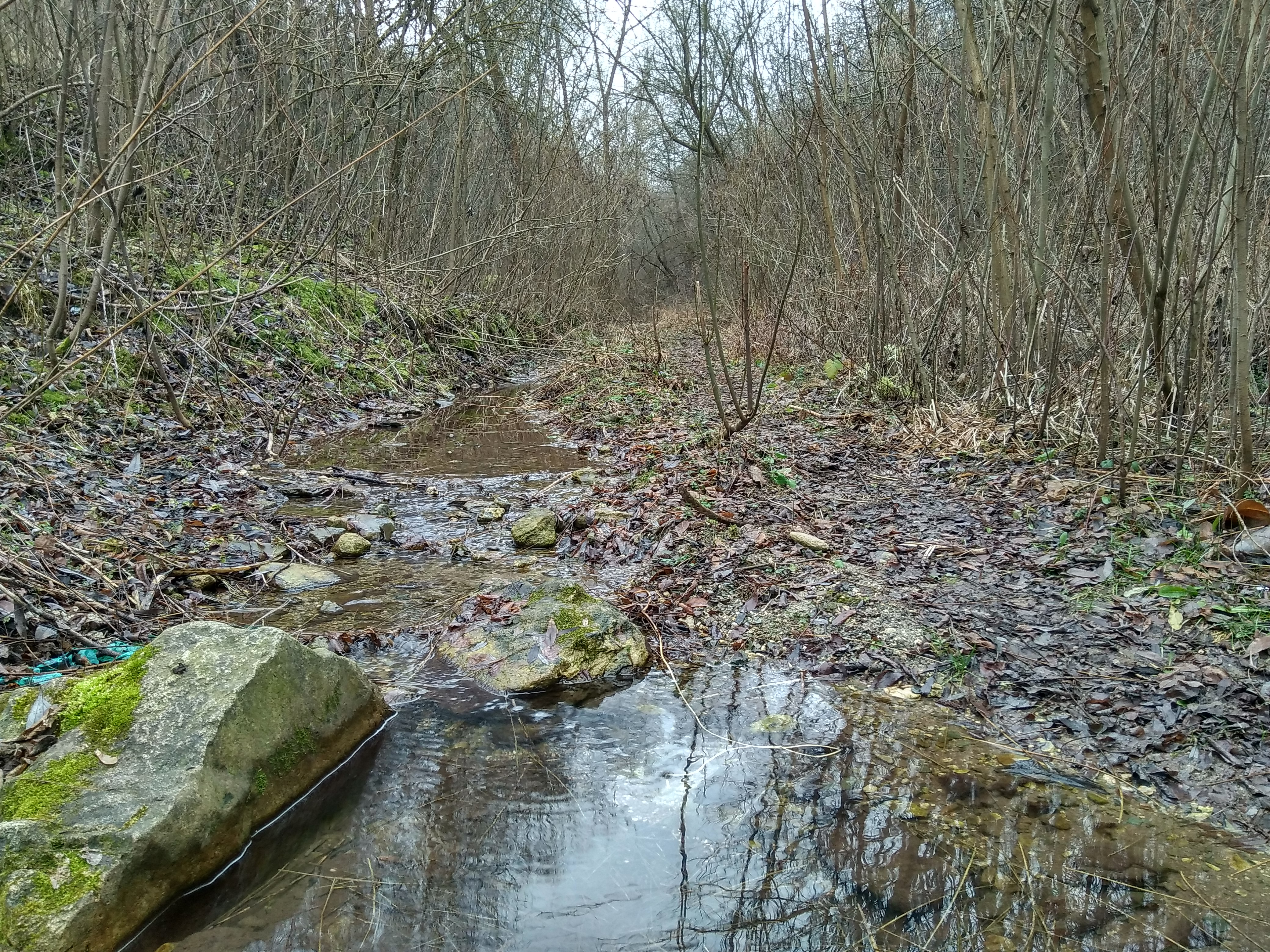 Râpa „La Izvoare”, monument al naturii amplasat în raionul Ocnița, la sud de orașul Otaci (cod MD-OC-mn.A-053) A-053